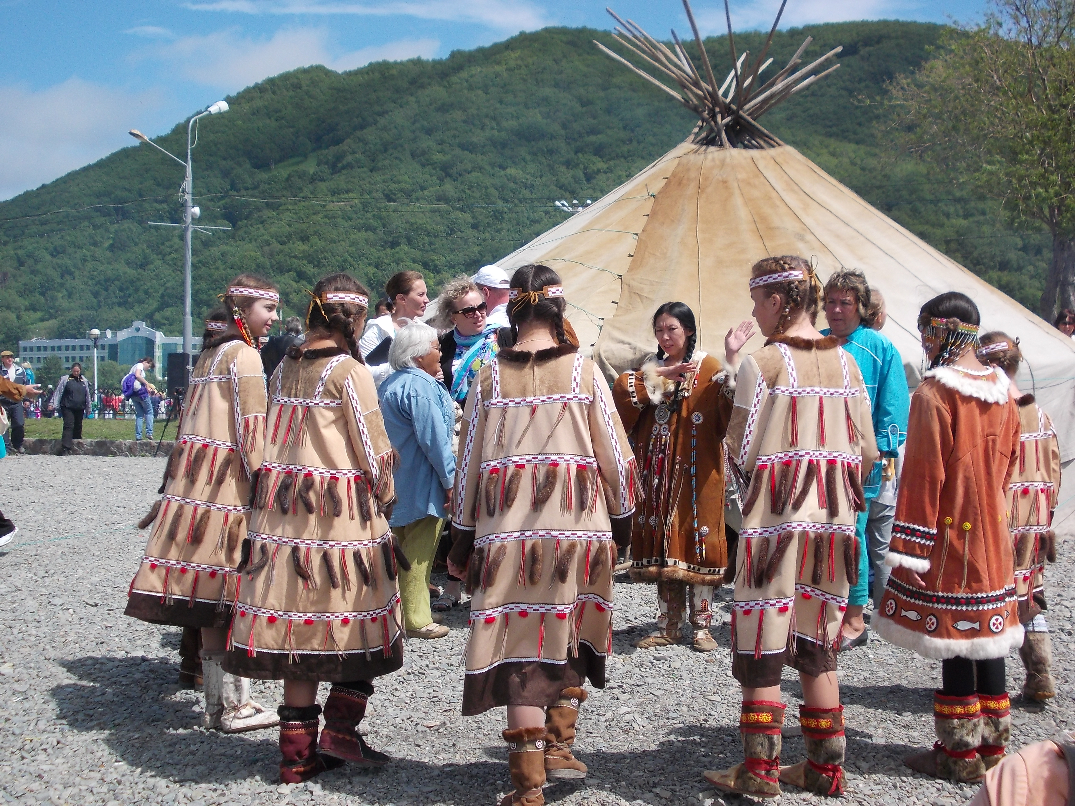 Itelmeński zespół taneczny "Łucz" przed występem podczas Dnia Rybaka w Pietropawłowsku Kamczackim